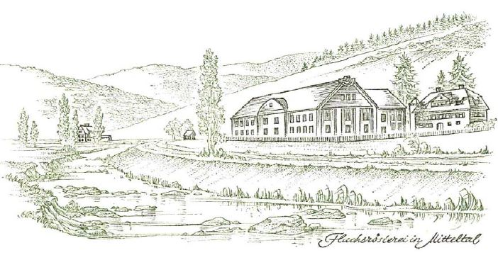 Bild der Flachsrösterei Mitteltal